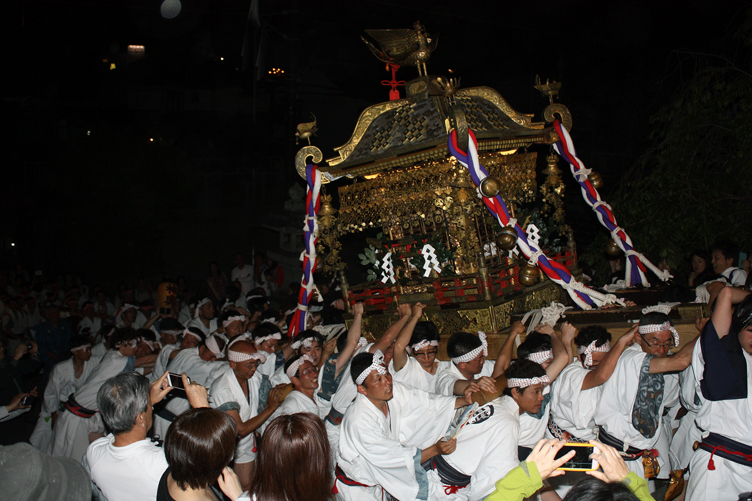 山王祭神輿巡幸の夜のお宮入り